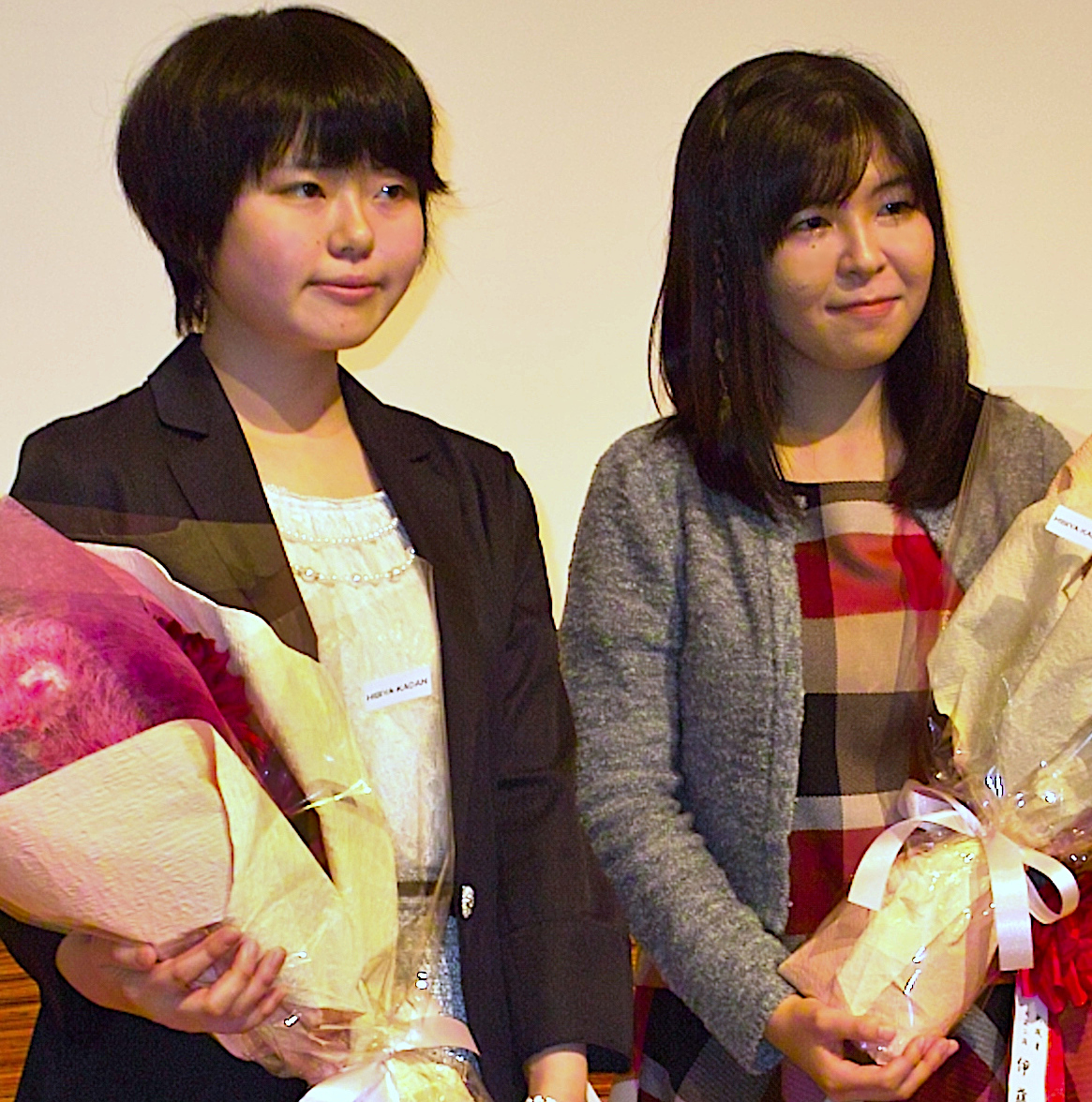 加藤桃子女王・女流王座（左）、伊藤沙恵女流二段（右）。第5期リコー杯女流王座戦第1局前夜祭にて